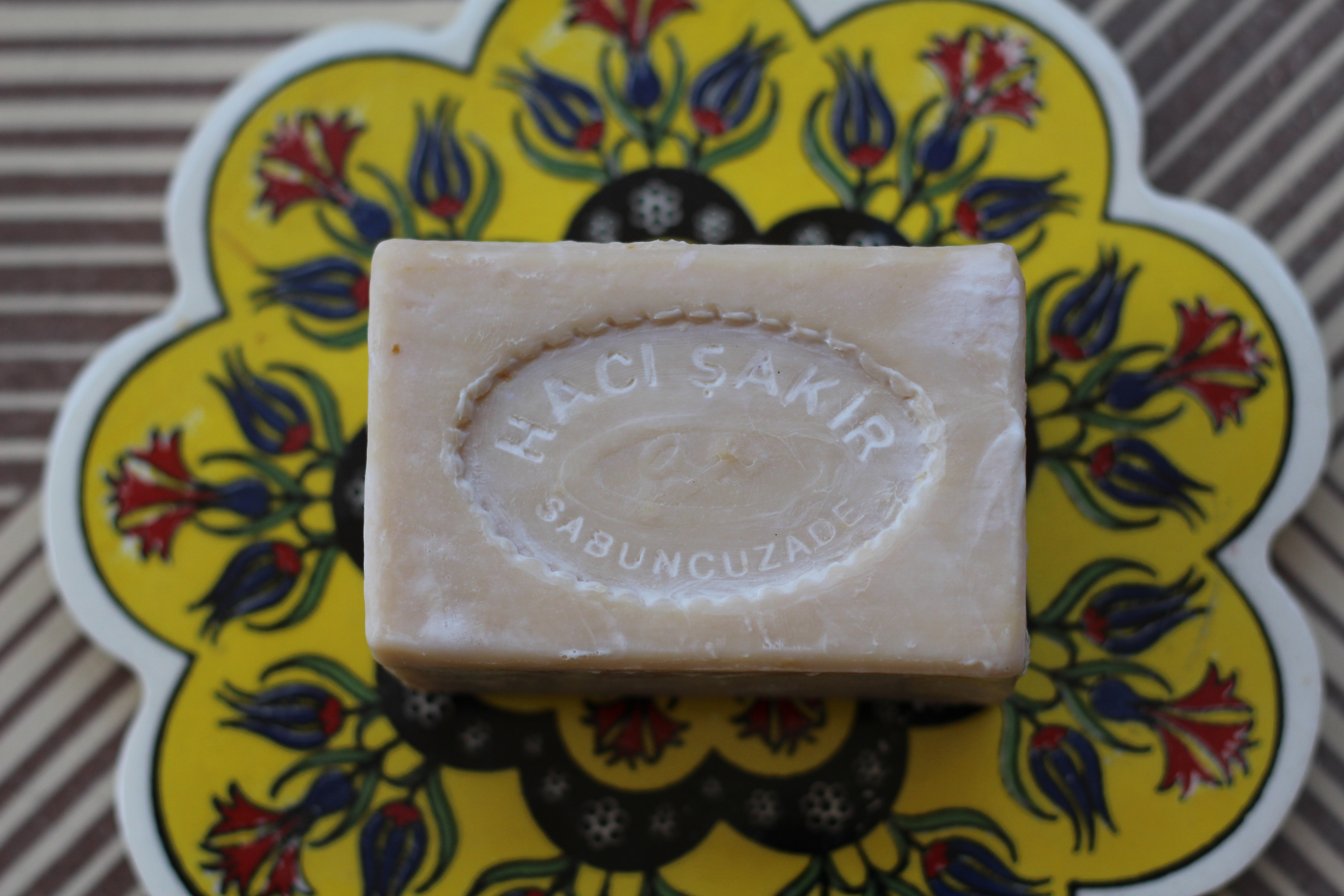 Հաջը Շաքիր օճառ, Soap Hacı Şakir